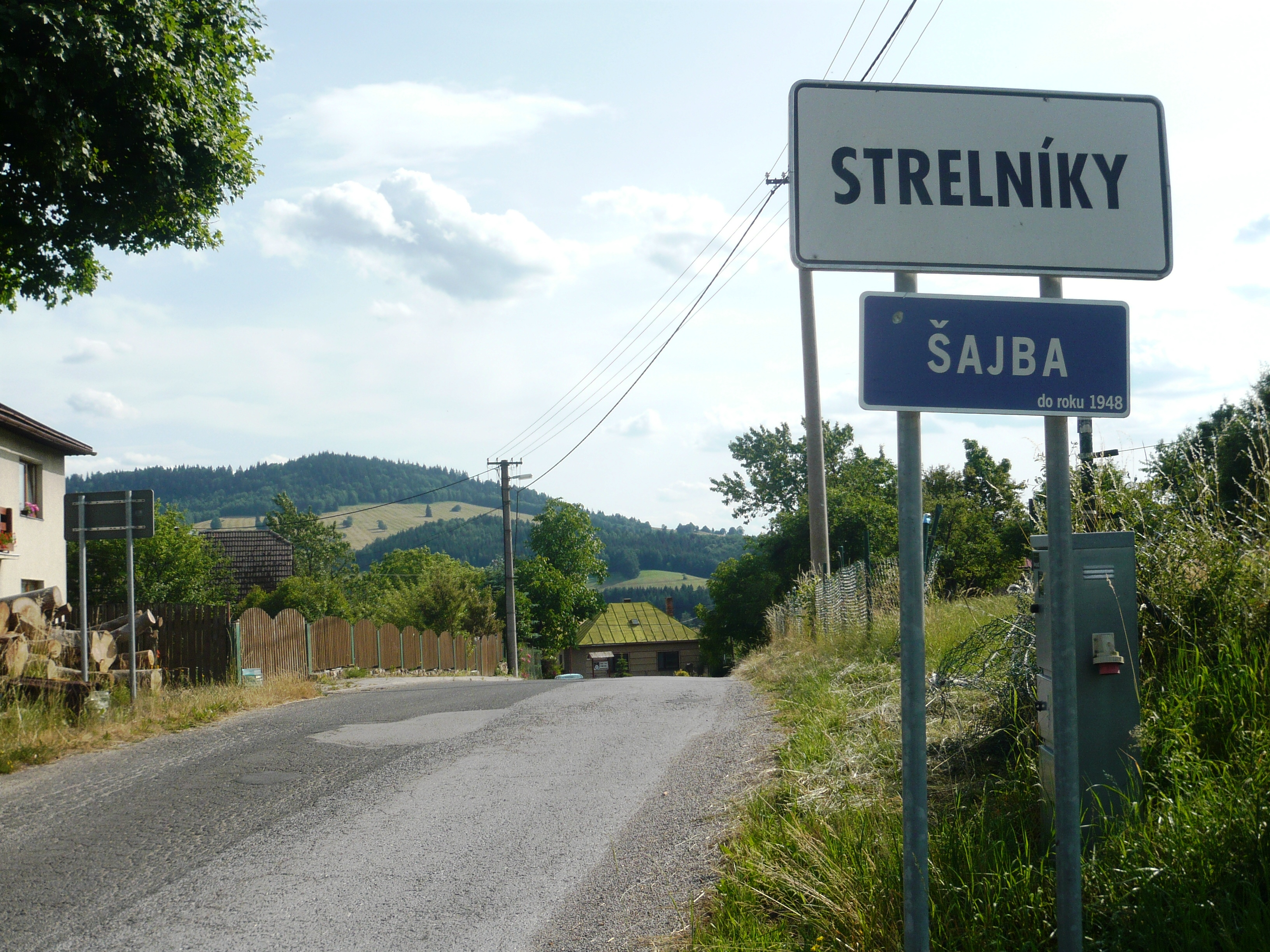 Víta Vás obec Strelníky (do roku 1947 Šajba)